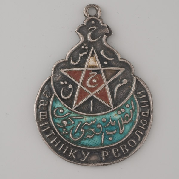 Орден Красной Звезды Бухарской НСР, учрежден постановлением Президиума Всебухарского ЦИК от 3 июля 1922 года. Орден 3 степени - медаль «Защитнику Революции»